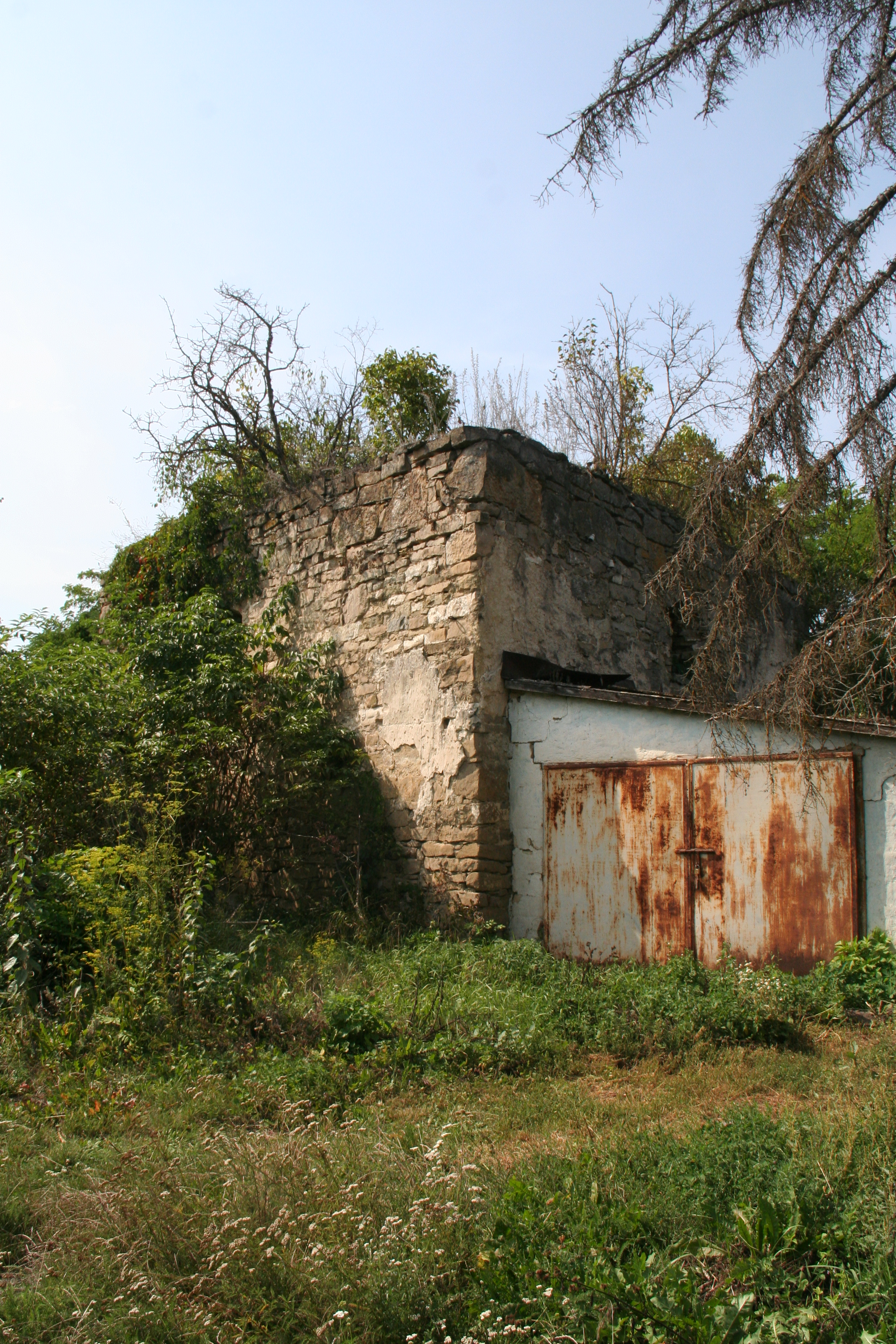 Залишки вежі Рихтівського замку на приватному обійсті, серпень 2019 року